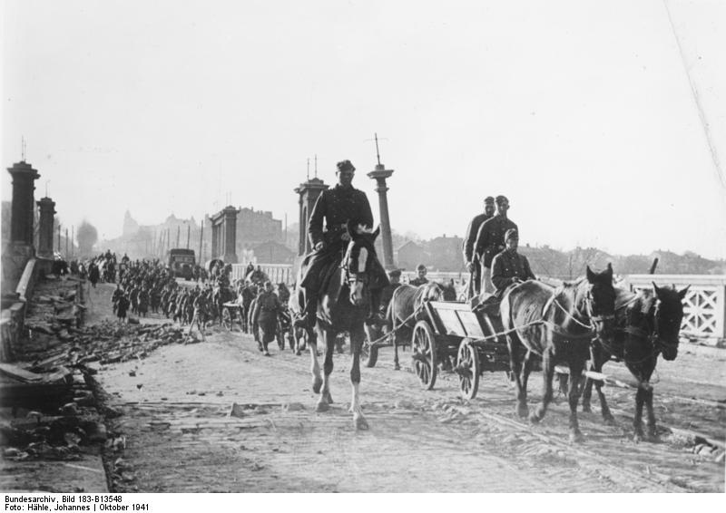 An der Sowjetfront: Immer neue Truppen ziehen von Westen kommend in die Stadt. Charkow. PK-Aufnahme: Kriegsberichter: Hähle 10082-41 "Fr." "Fr.OKW" Okt.41 Information added by Wikimedia users. Свердловский путепровод через ЮЖД в Харькове, мина Старинова ещё не взорвана, октябрь, после 25 октября 1941. На горизонте Холодная Гора.